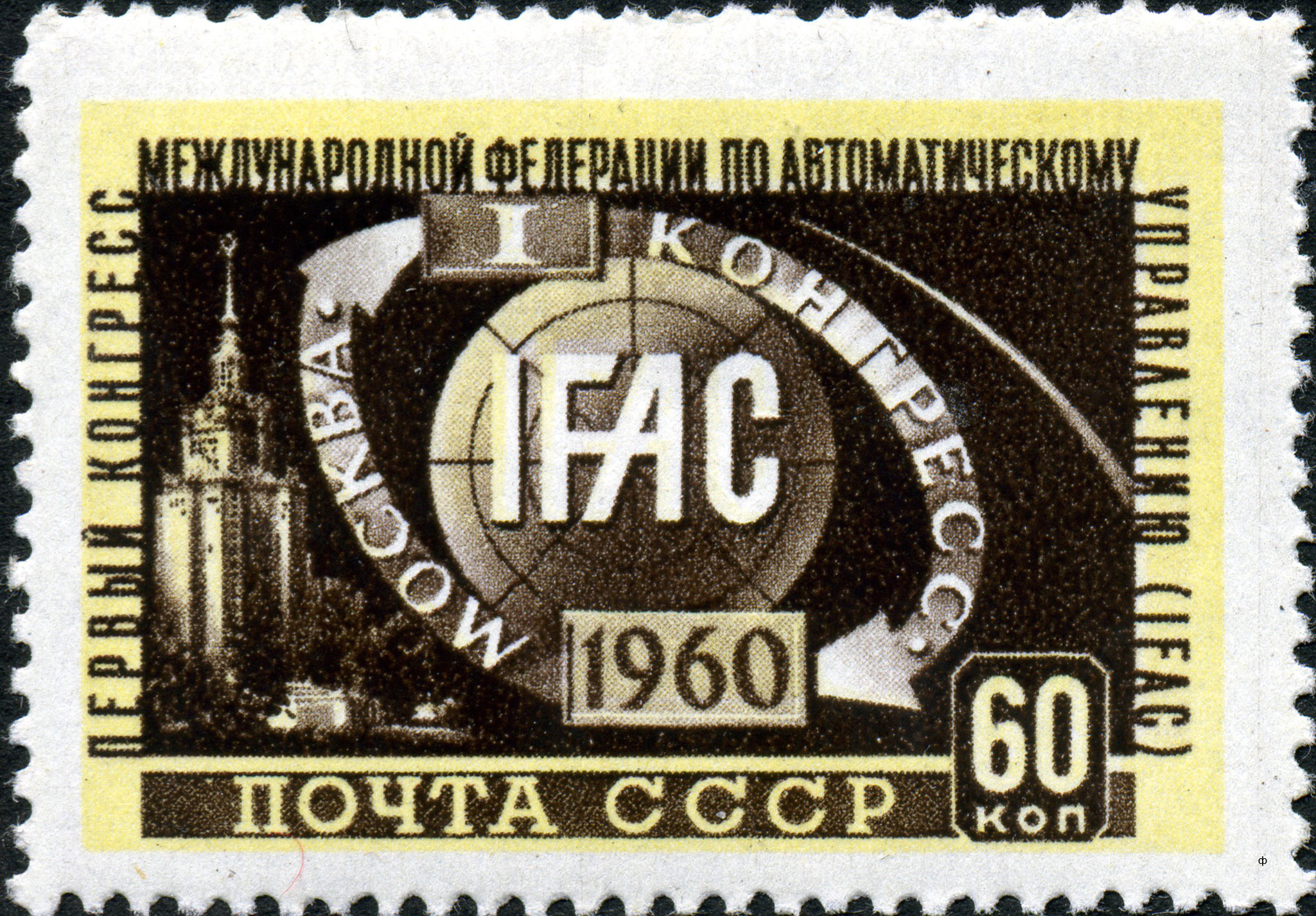 Марка СССР International Federation of Automatic Control